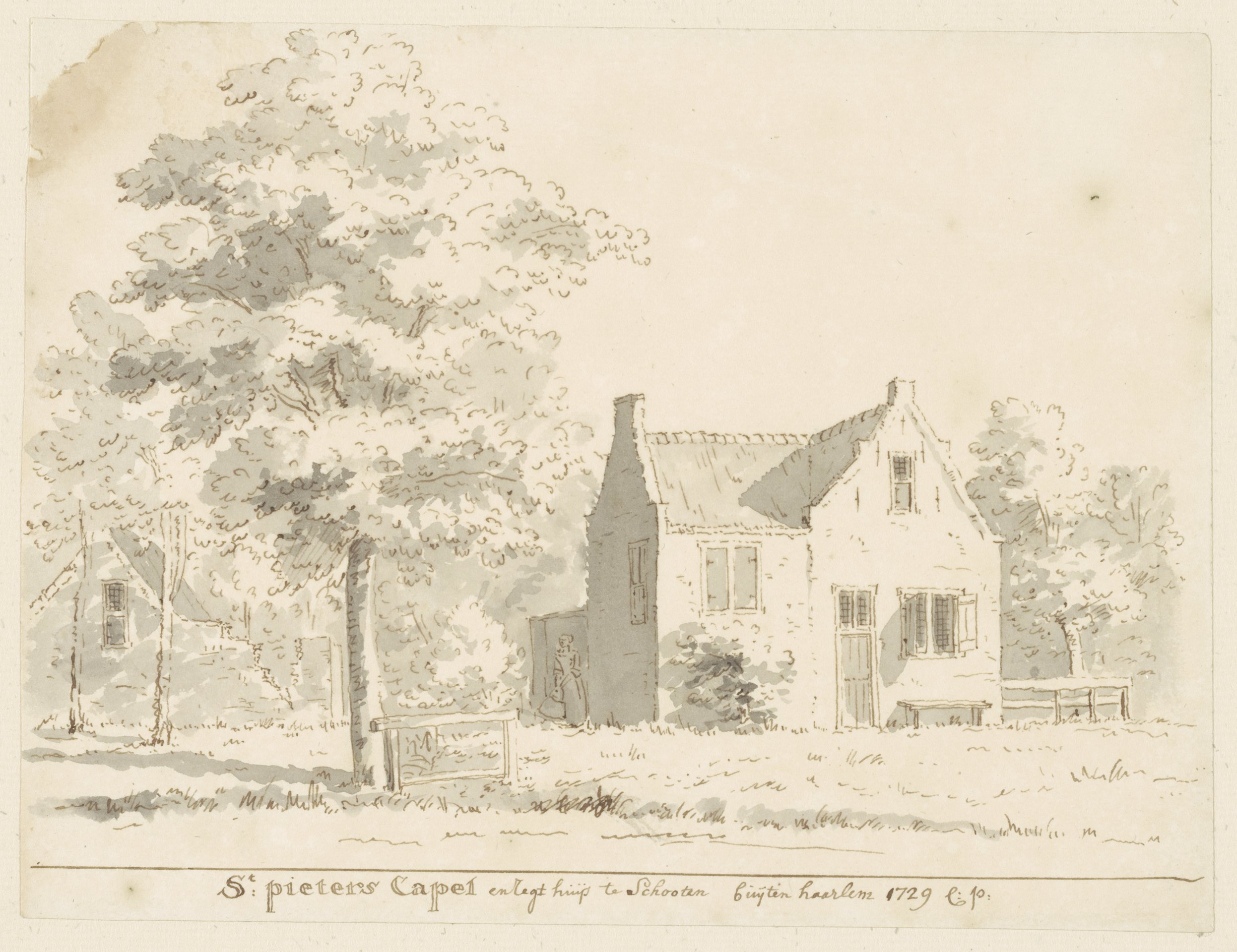 St. Pieters Capel en regthuijs te Schooten buijten haarlem 1729 Het rechthuis van Schoten, eertijds St. Pieterskapel, thans liggende aan de Vergierdeweg 12 tekening in Oost-Indische inkt